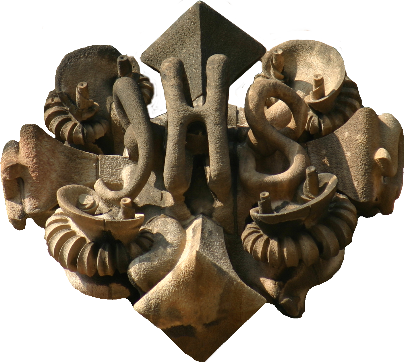 JHS, Templo Expiatorio de la Sagrada Familia. Barcelona, Catalonia (España).